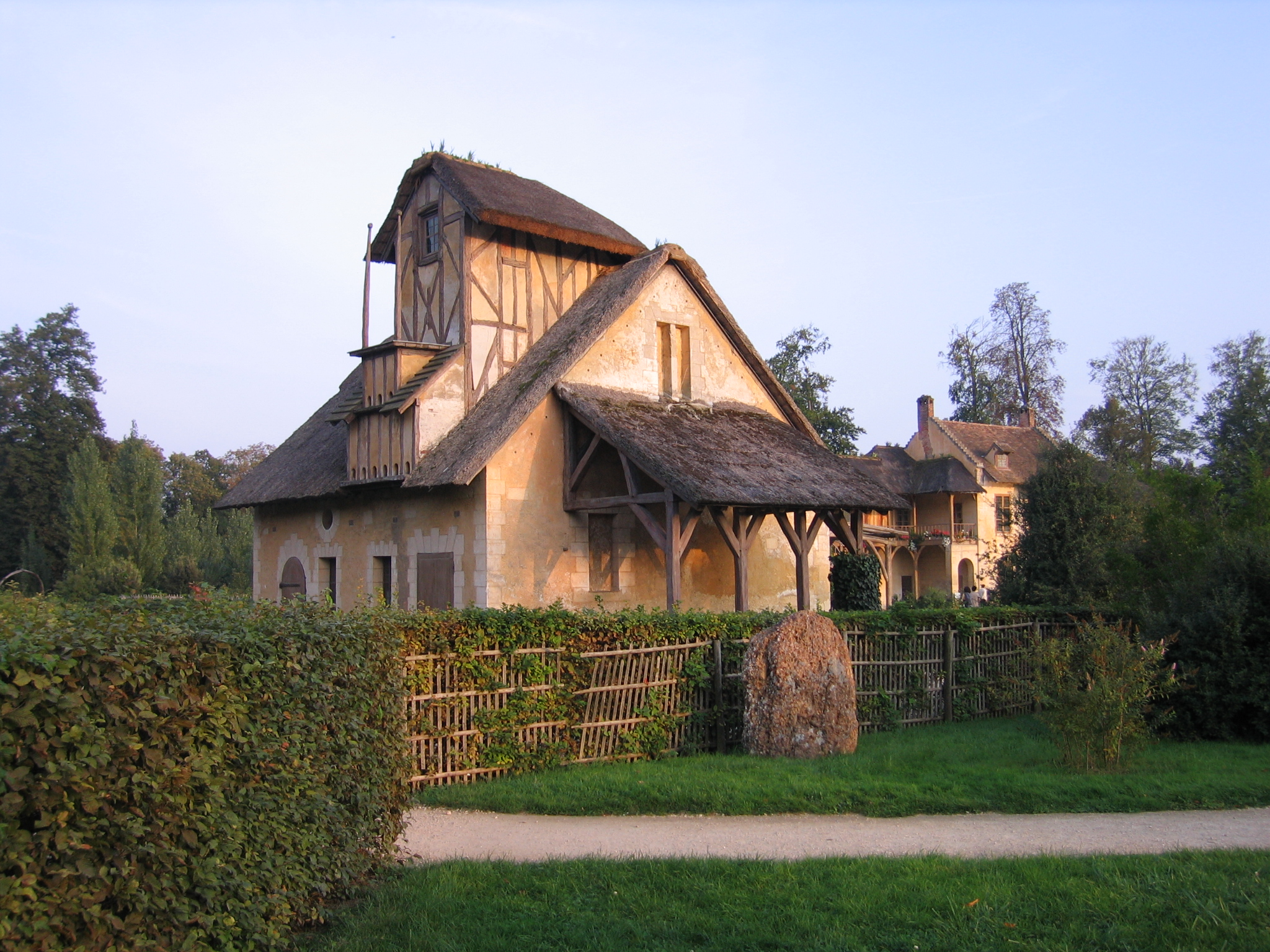 Colombier du Hameau de la Reine - Versailles